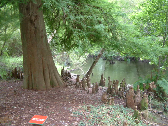 Taxodium distichum (cyprès chauve) along Courant d'Huchet in Landes, France.